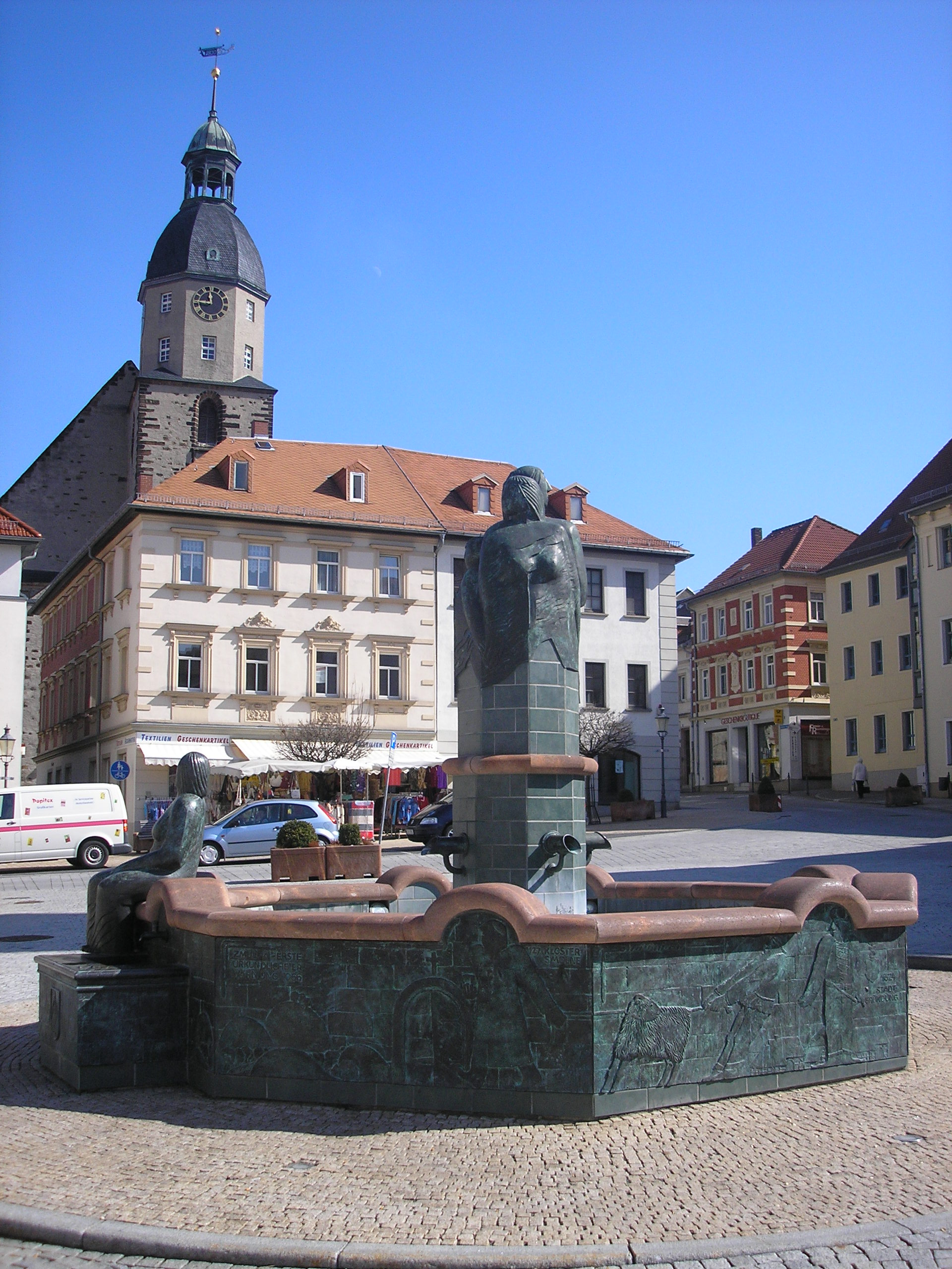 Der Marktbrunnen in Schmölln (Thüringen).